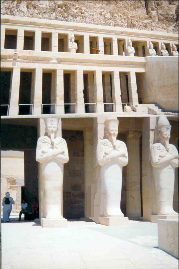 Estatues d'Hatshepsut al seu temple, amb la falsa barba, imatge propia